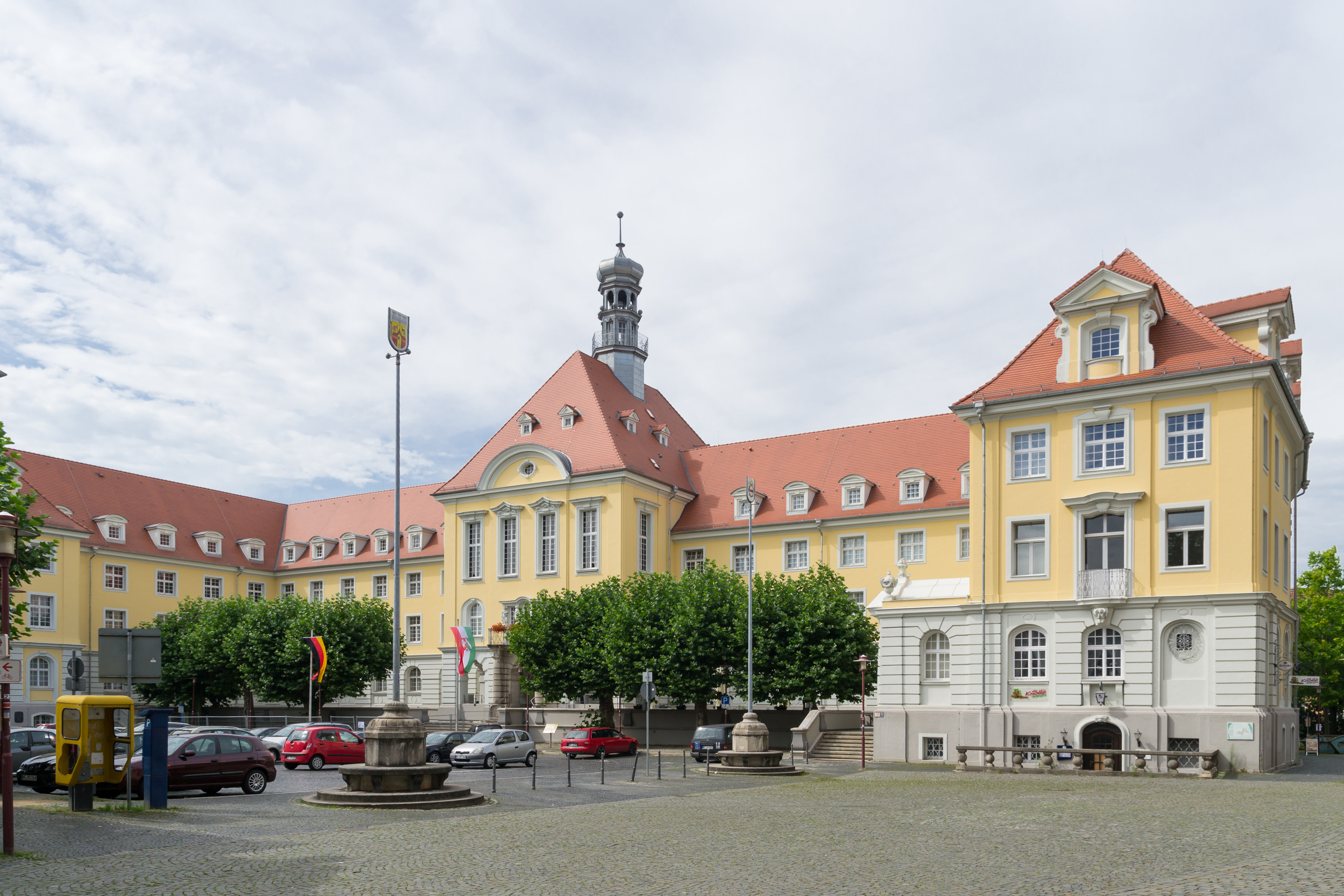 This image shows a heritage building in Germany, located in the North Rhine-Westphalian city Herford (no. 12). Rathaus